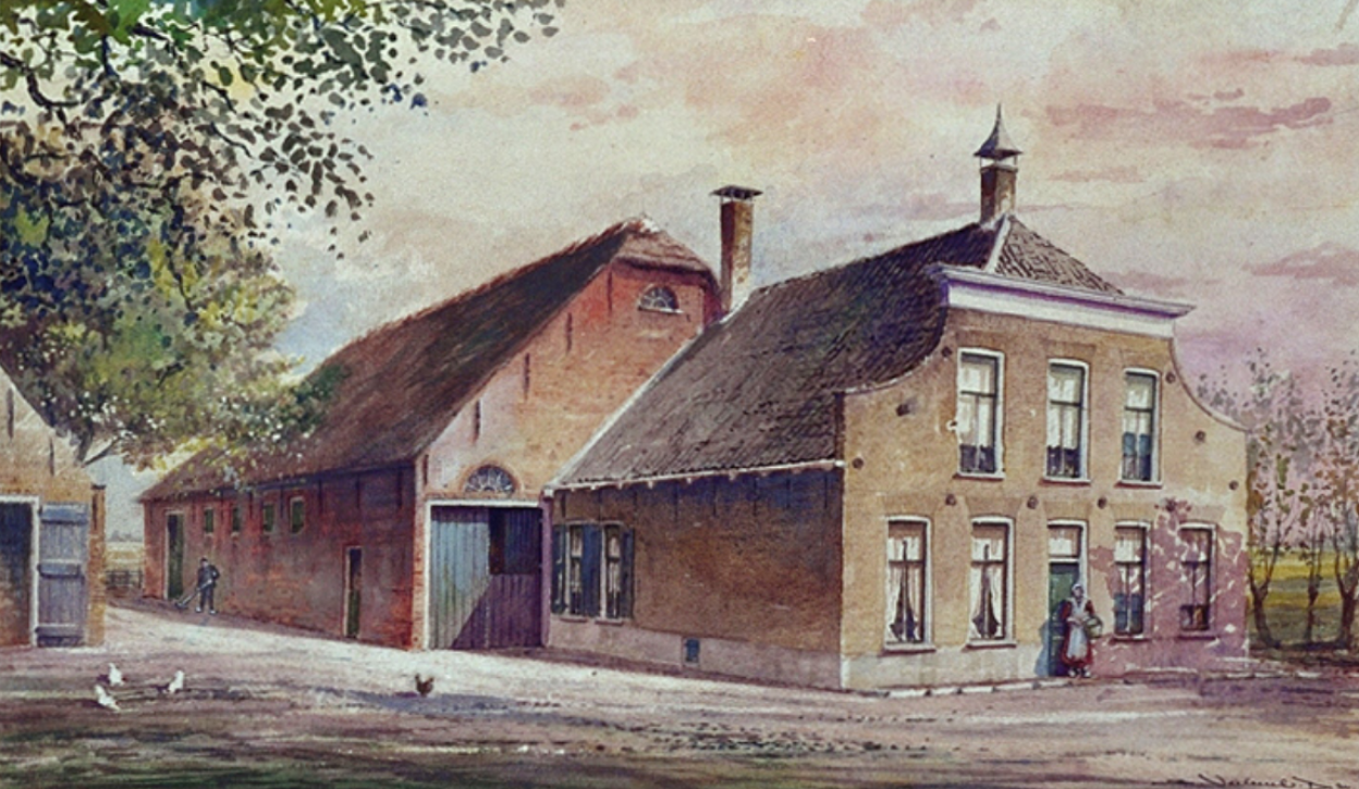 Hartelhoeve op de Welplaat, aquarel van J. Verheul Dzn. ± 1900. Tijdens de Tweede Wereldoorlog is deze boerderij verwoest door bommen door Engelse vliegruigen. Bronː Spijkenisse en Hekelingen in oude ansichten / Jan de Baan. - Zaltbommelː Europese Bibliotheek, 1975, foto 8.